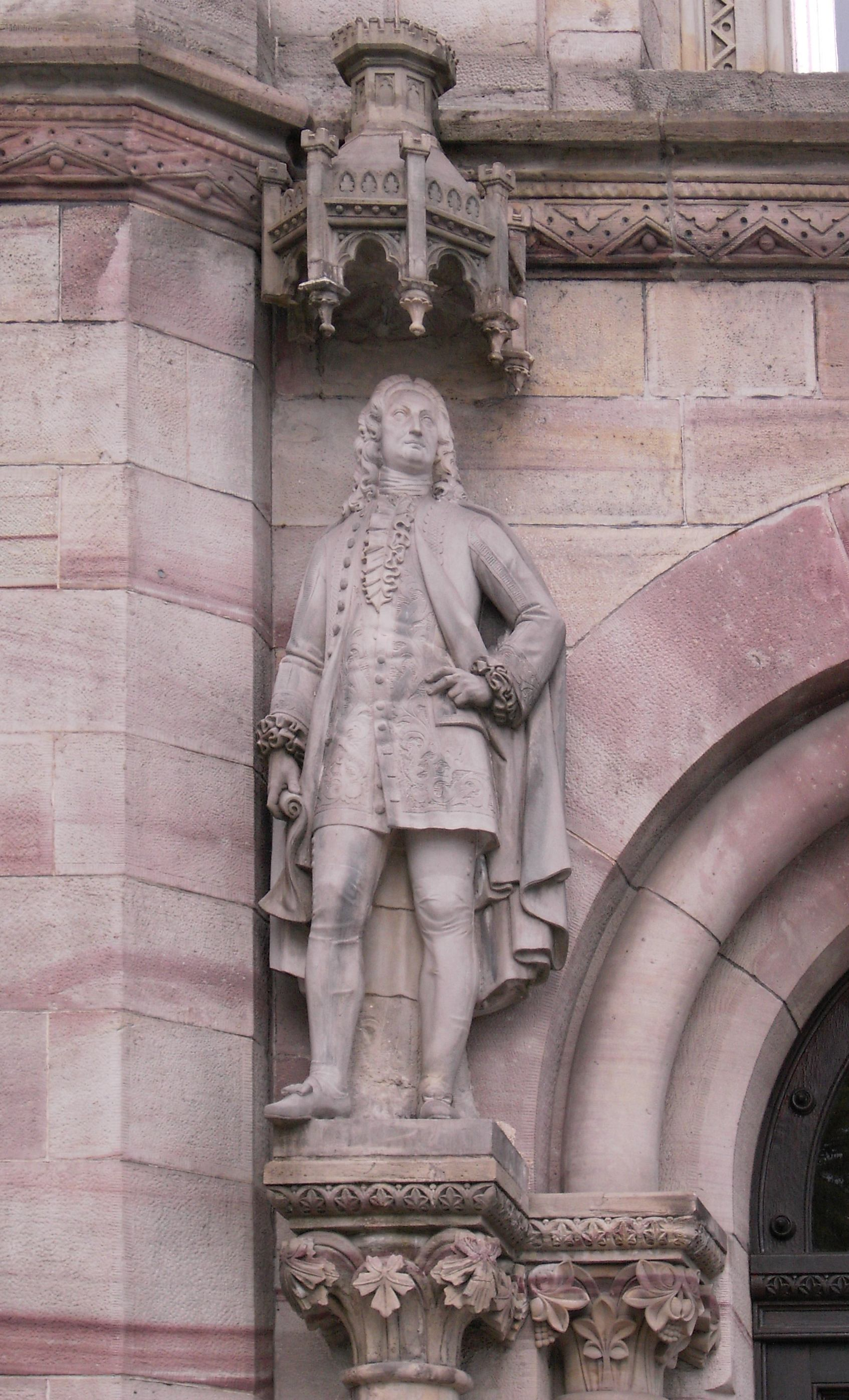 Göttingen, Auditorium, Statue of Gerlach Adolph Freiherr von Münchhausen, founder of Georg-August-Universität Göttingen.